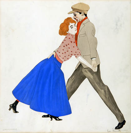 Apachentanz, 1911, Lichtdruck, koloriert auf wolkenmarmoriertem Karton – Apachentanz = Kein Indianertanz, sondern ein Varietétanz, der um 1900 in Paris entstand und das Verhältnis zwischen einer Dirne und eines Zuhälters akrobatisch und pantomimisch darstellt